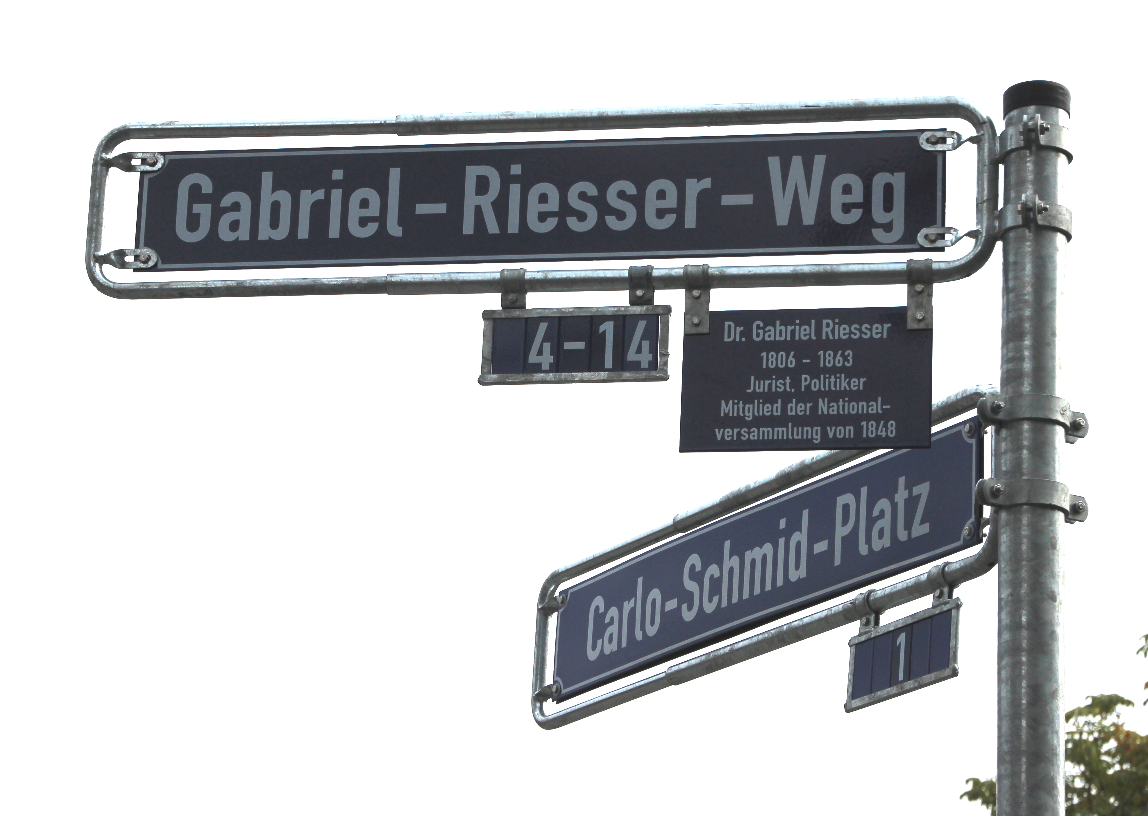 Bildinhalt: Straßenschild Ecke Gräfstraße und Gabriel-Riesser-Weg, am Carlo-Schmid-Platz, vor dem Bockenheimer Depot Aufnahmeort: Frankfurt am Main, Deutschland